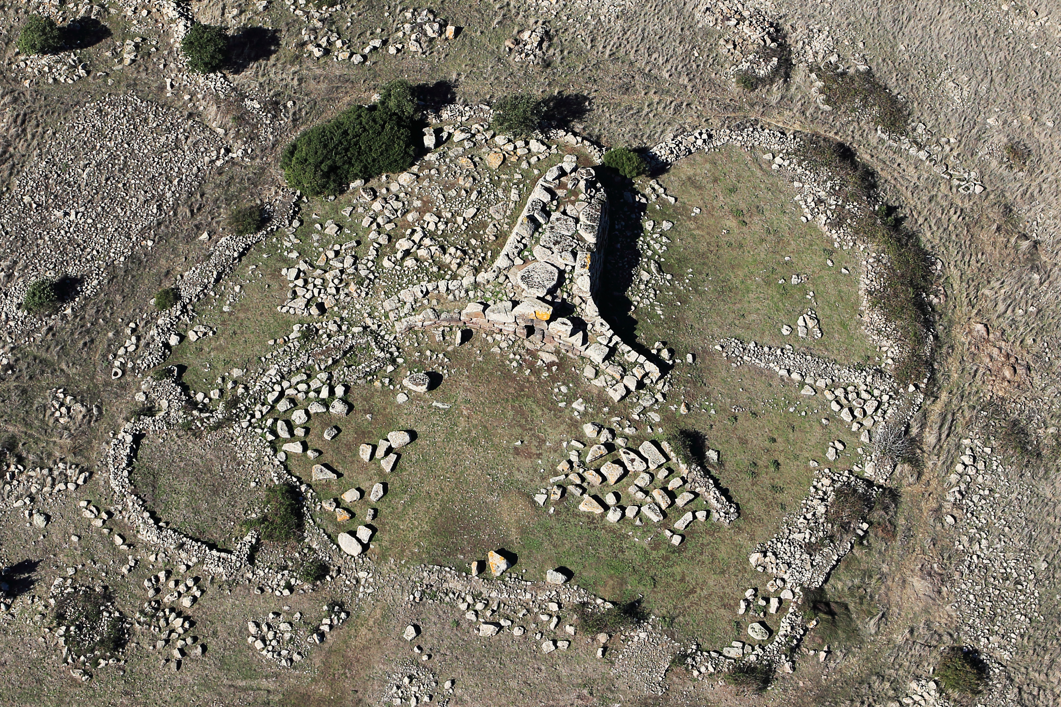 Tomba dei Giganti Sa Domu 'e S'Orku This is a photo of a monument which is part of cultural heritage of Italy.